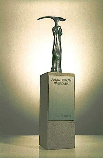 J. K. Alpinismiklubi rändauhind parimale alpinistile, autor on skulptor Rait Pärg